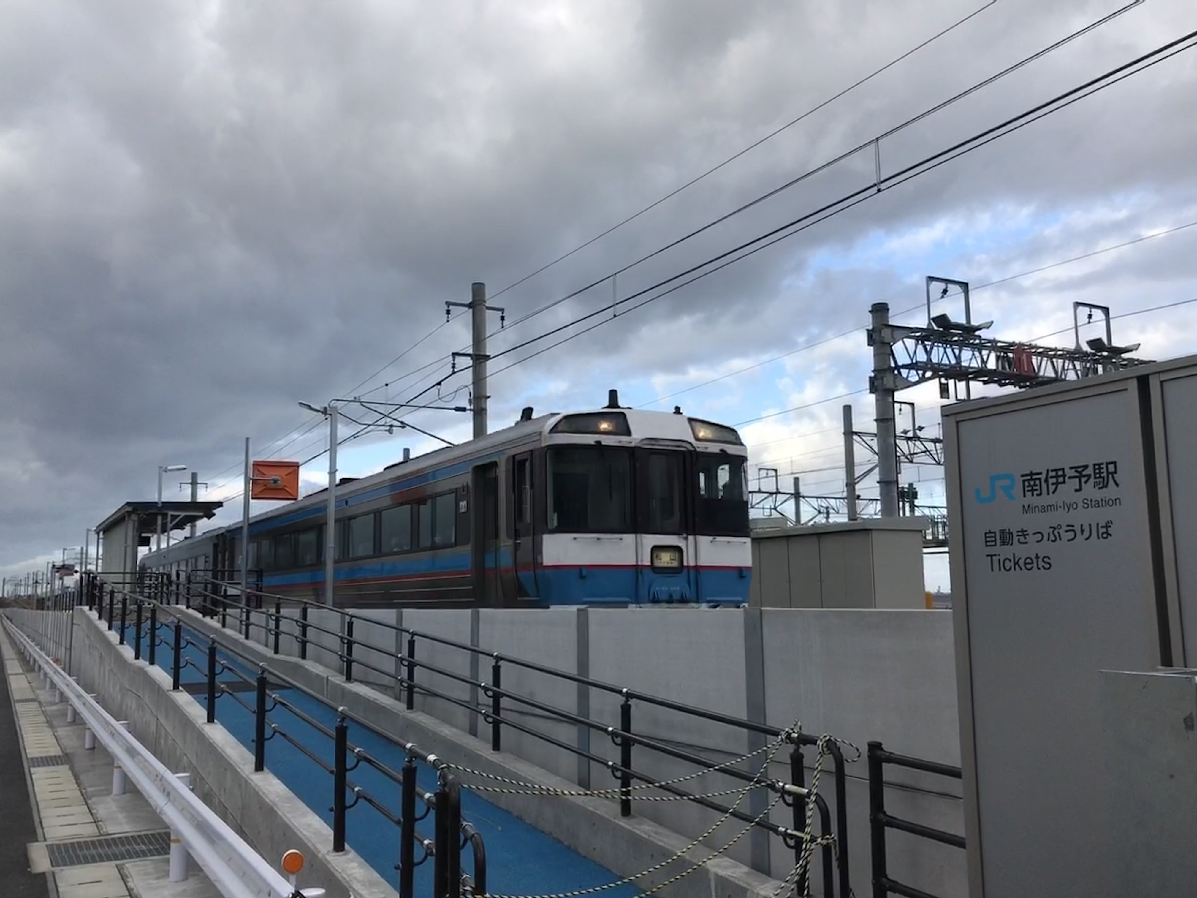 南伊予駅の開業前写真、2020/01/08撮影。注:車両は通過列車です。